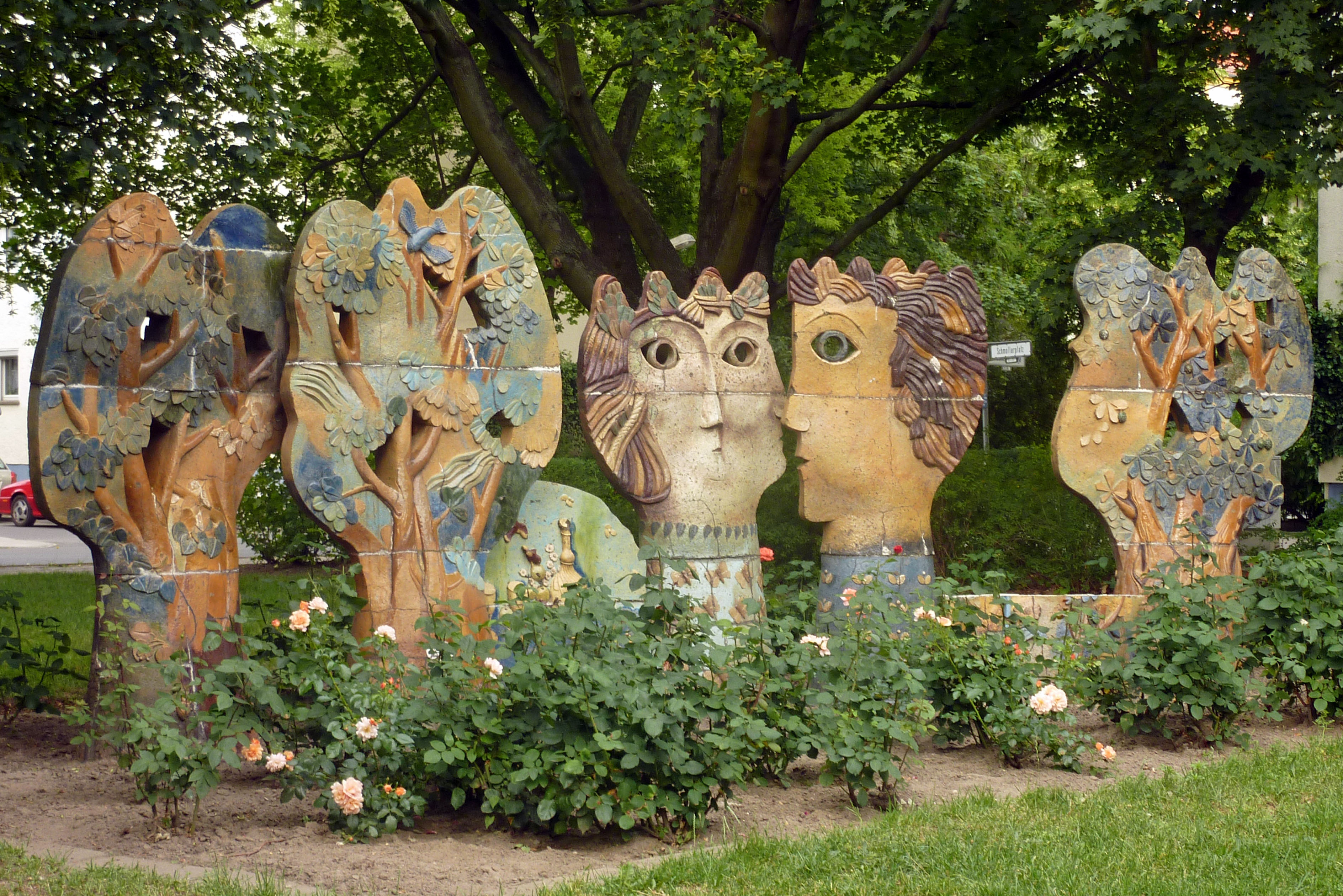 Plastik 'Baumträume' auf dem Schmollerplatz in Berlin-Alt-Treptow. Eine glasierte Aufbaukeramik von Christian Uhlig aus dem Jahr 1979.